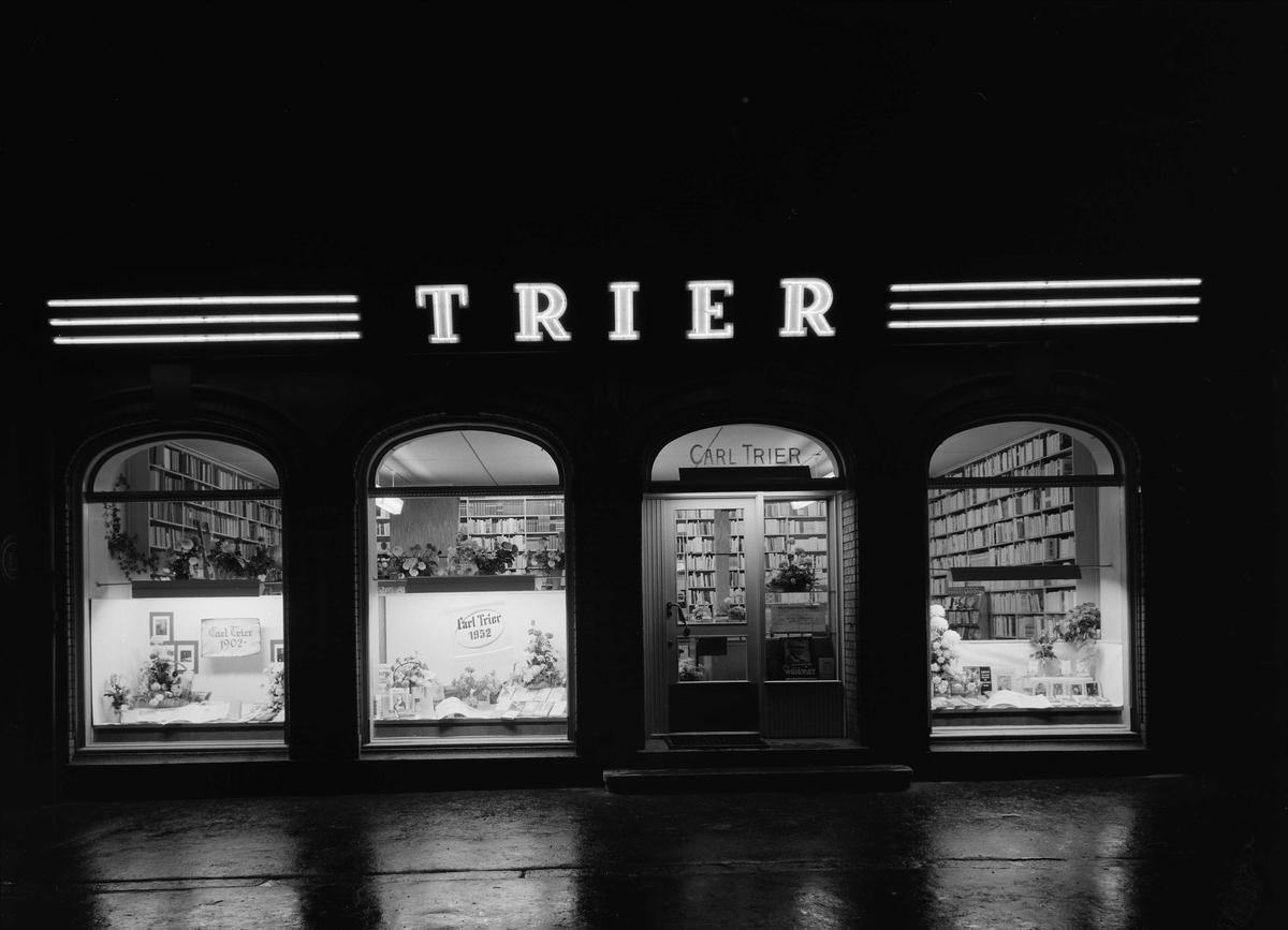 Triers bokhandel i Riddervolds gate 10B, omkring femtiårsjubileet. Foto: Leif Ørnelund, 12. november 1952. Fra Byhistorisk samling hos Oslo Museum.